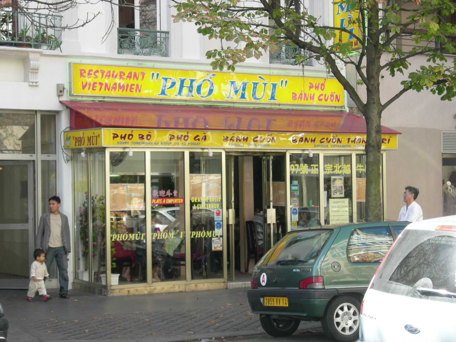 A "Phở" restaurant in Paris XIIIe arrondissement, Paris.